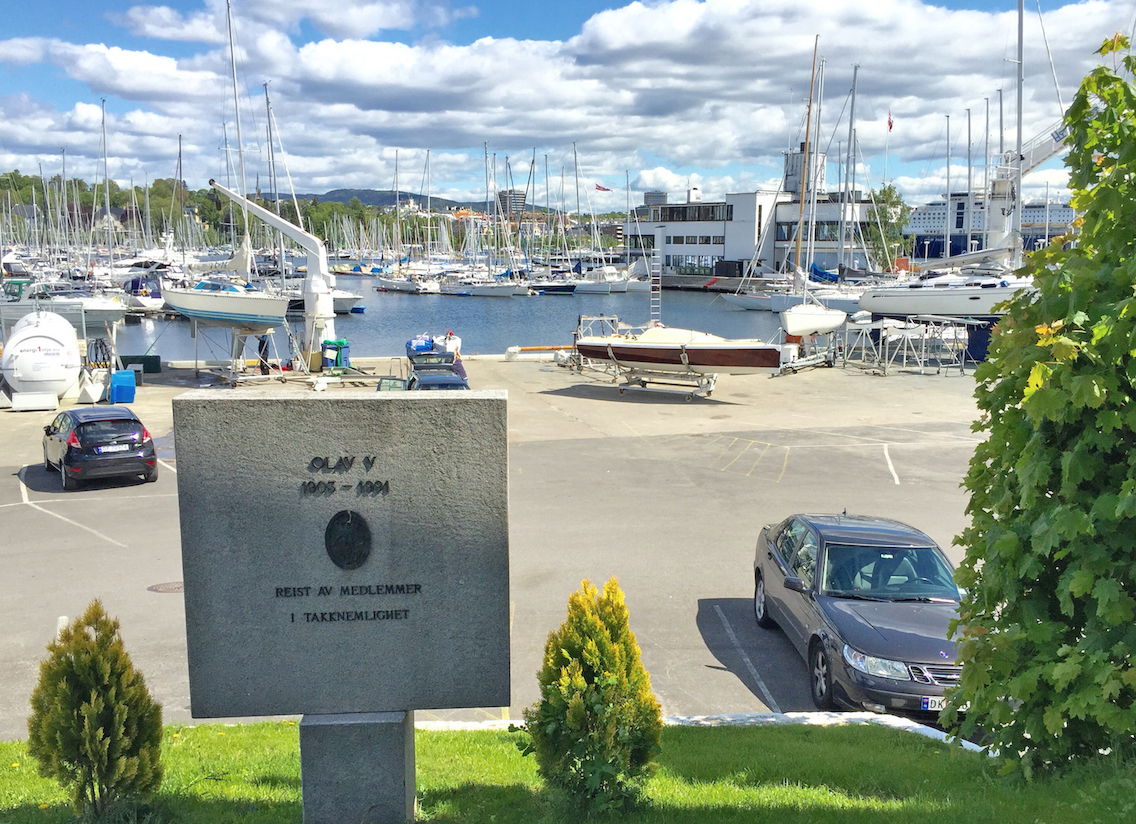 KNS havn med Dronningen på Bygdøy i Oslo.